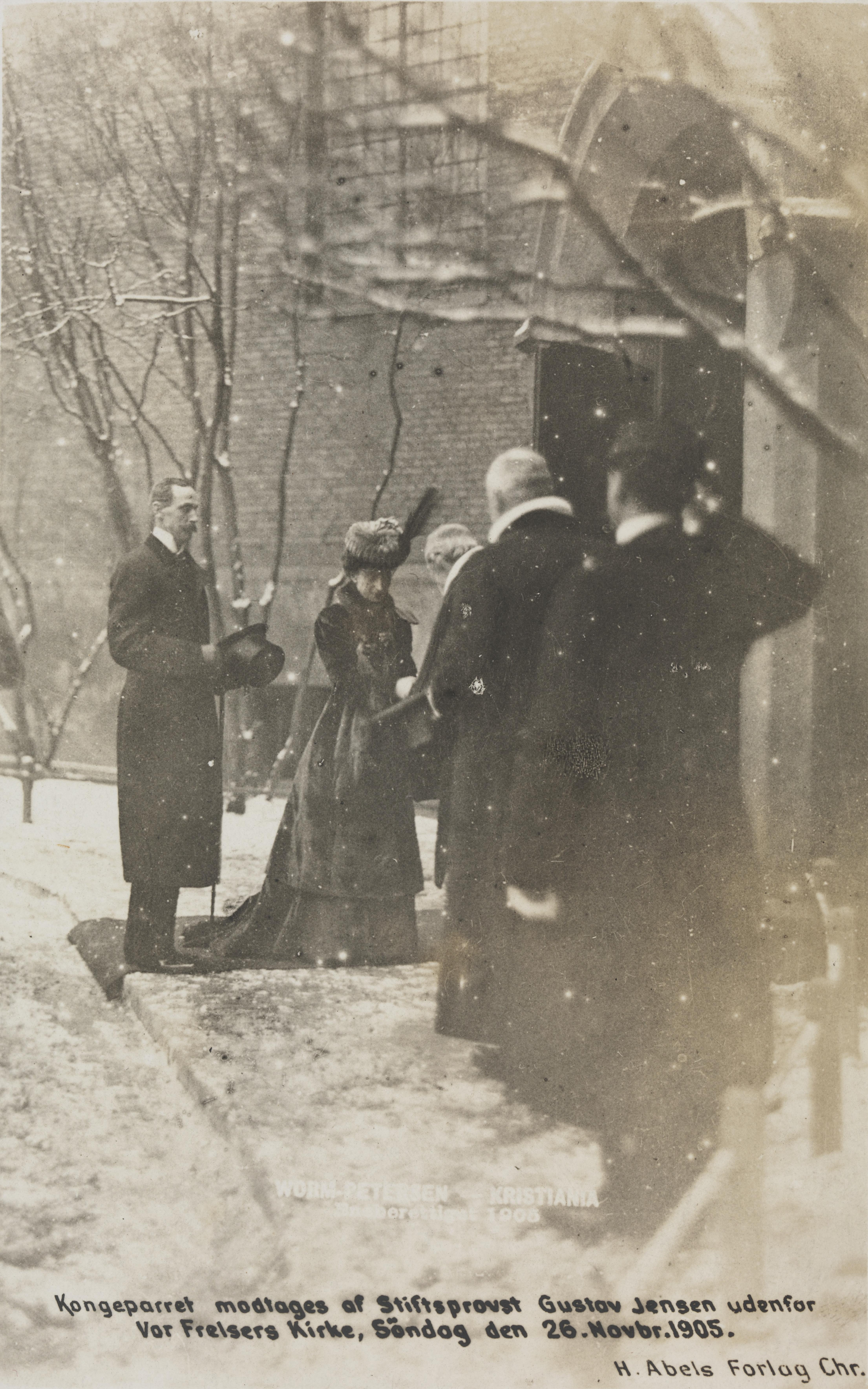 Bildet er hentet fra Nasjonalbibliotekets bildesamling Oslo domkirke, Oslo, Oslo Depicted person: Jensen, Gustav Depicted person: Haakon VII konge av Norge Depicted person: Maud dronning av Norge